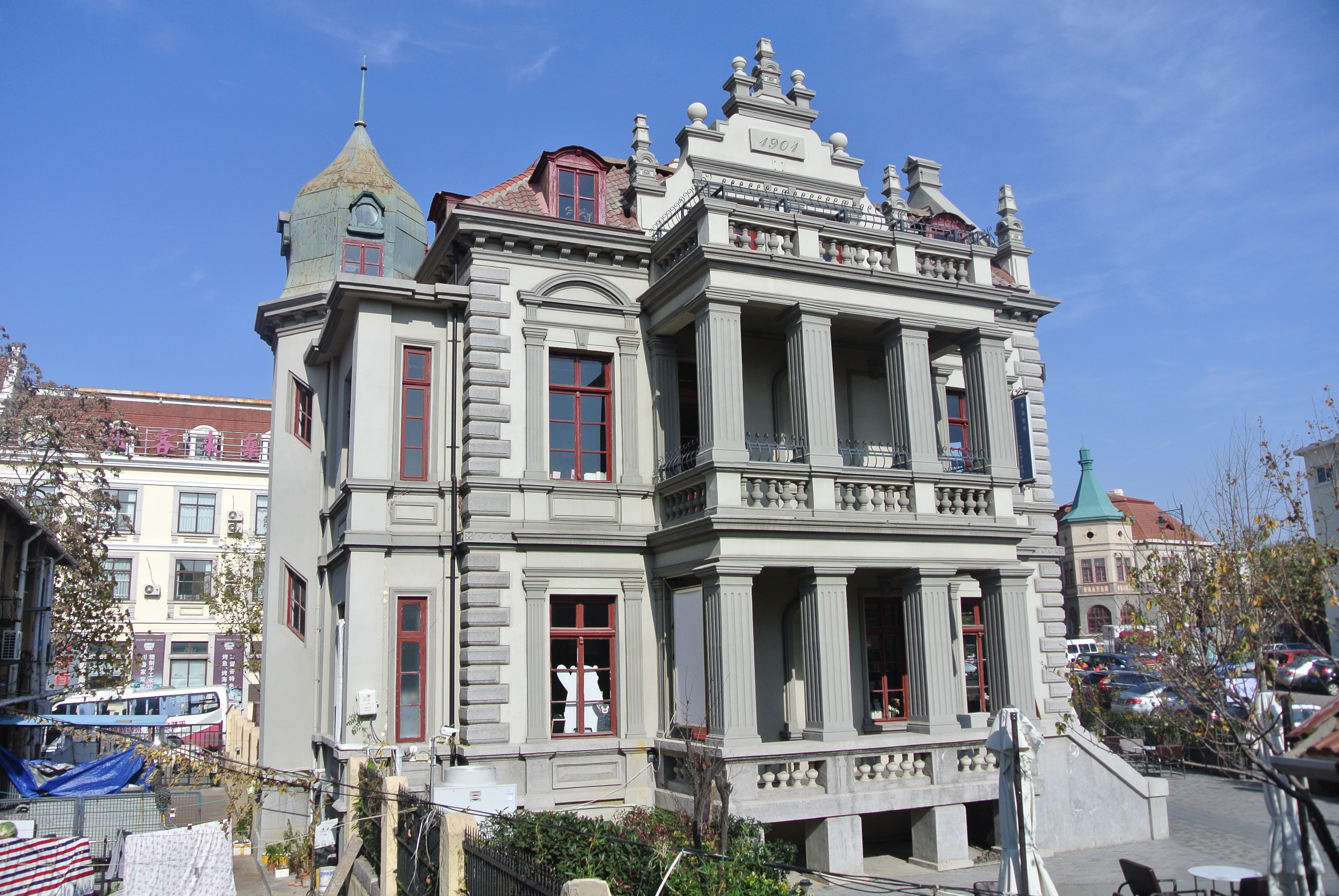 青岛安娜别墅